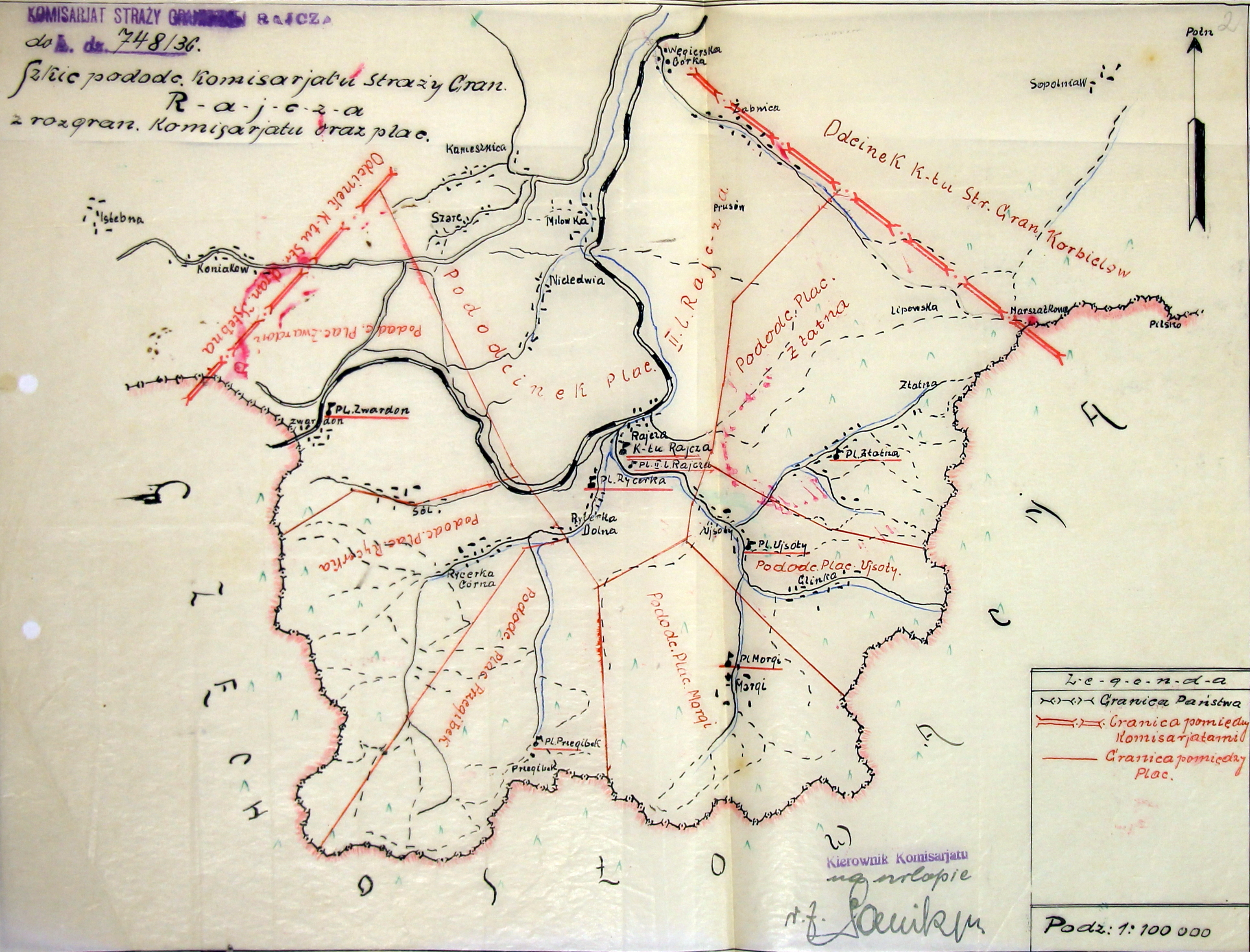 Szkic komisariatu SG Rajcza - lata 30. XX wieku